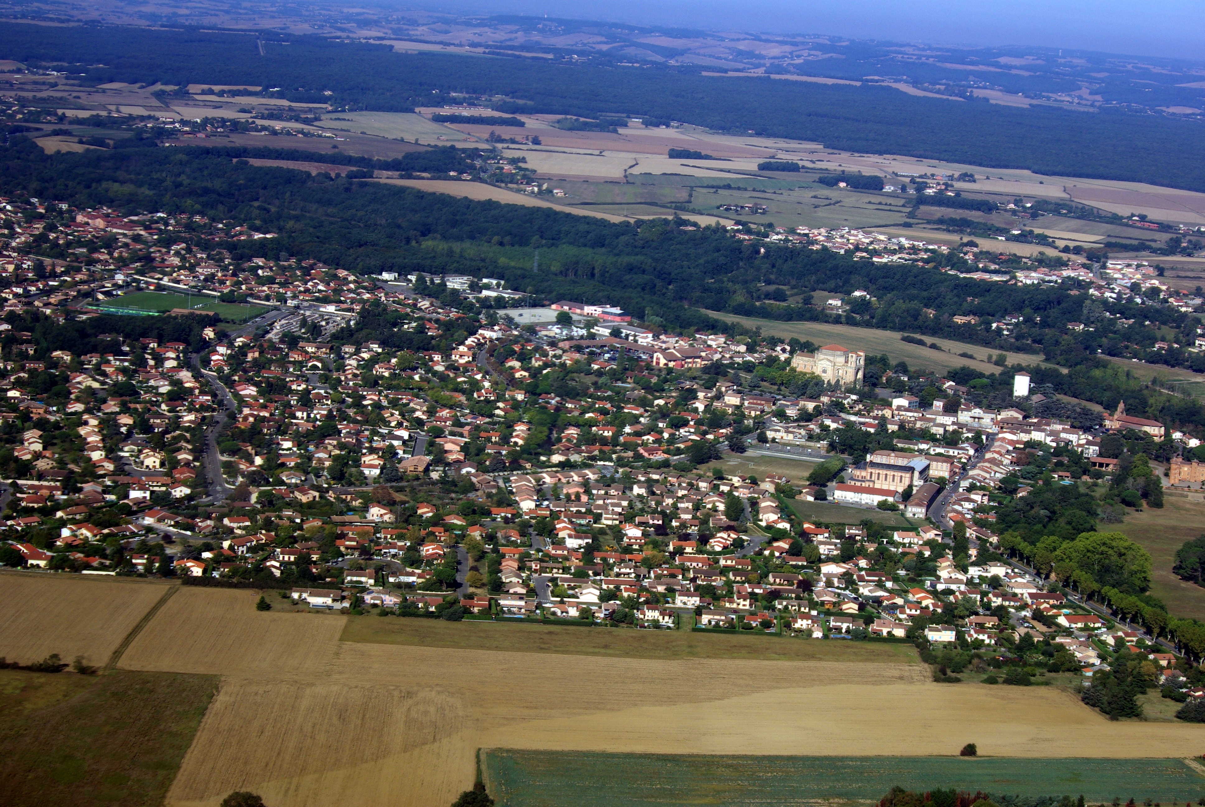 Vue aérienne de Pibrac.